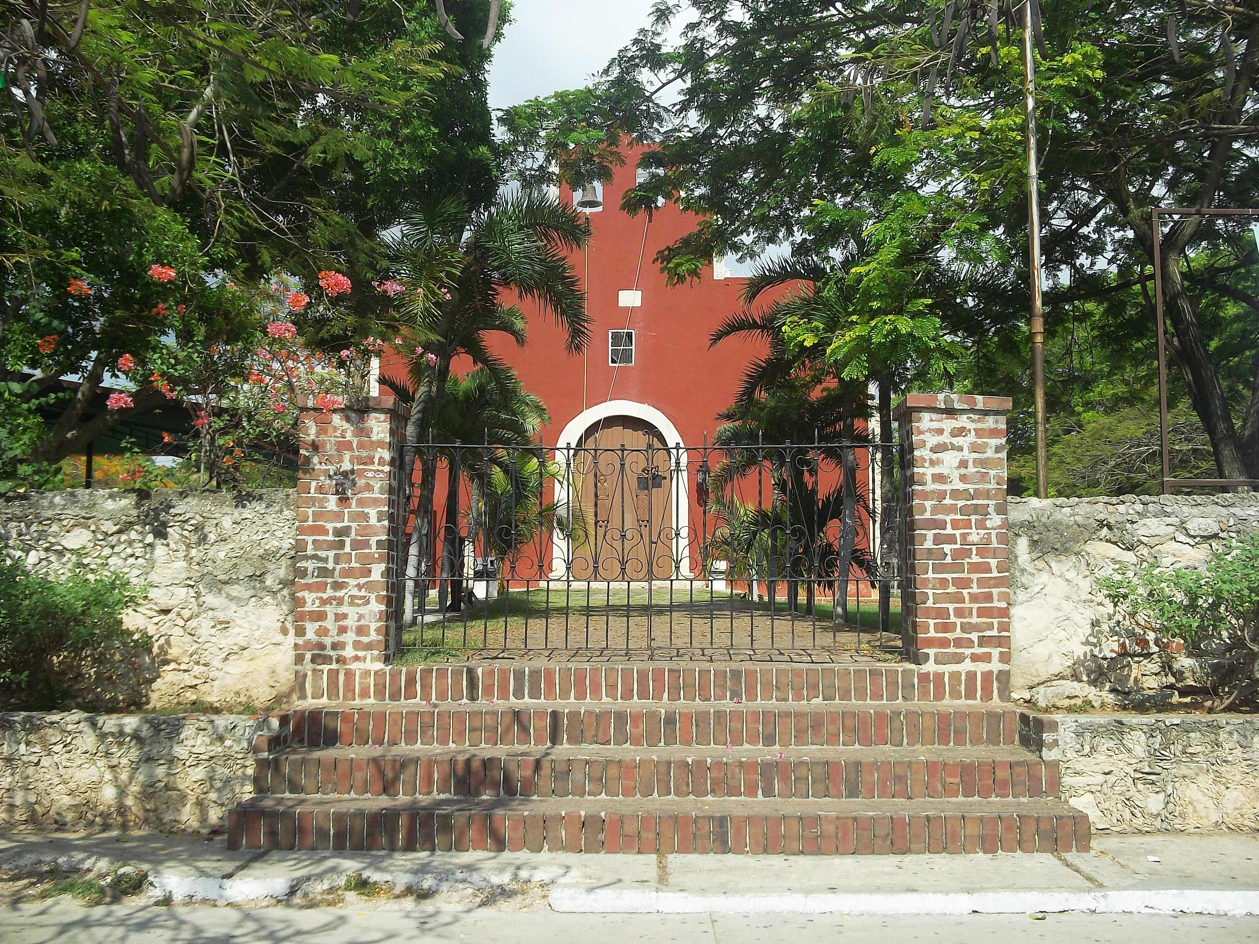 Iglesia de Chuburná, Yucatán.